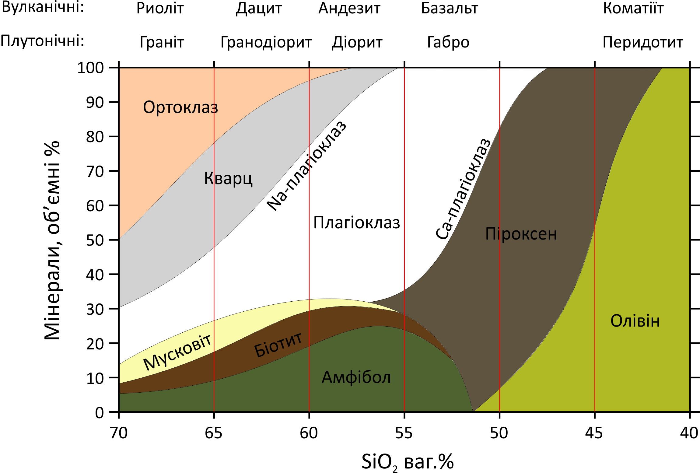 переклав цю петрохімічну діаграму українською